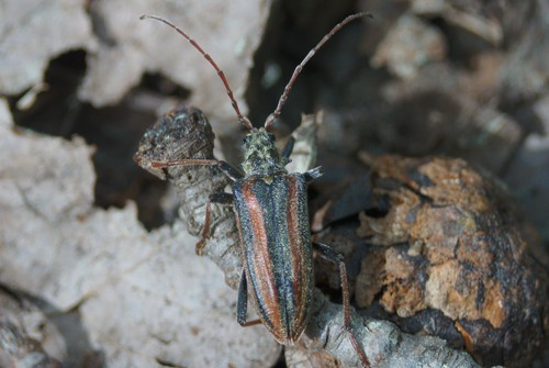 Randig skulderbock i urskogen Ryssbergen i Nacka